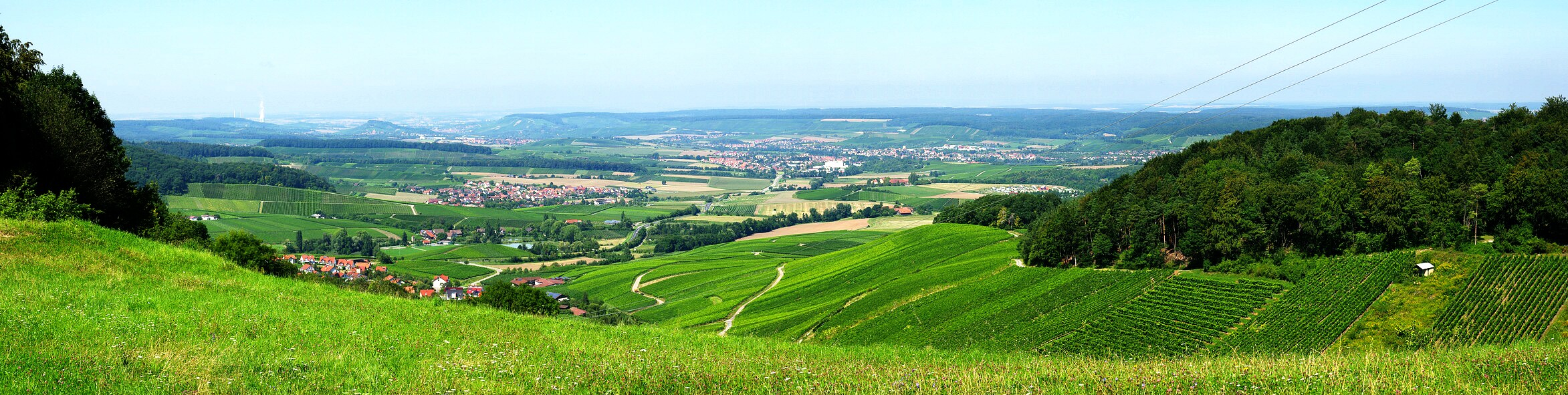 Panorama Sulmtal von Löwenstein aus